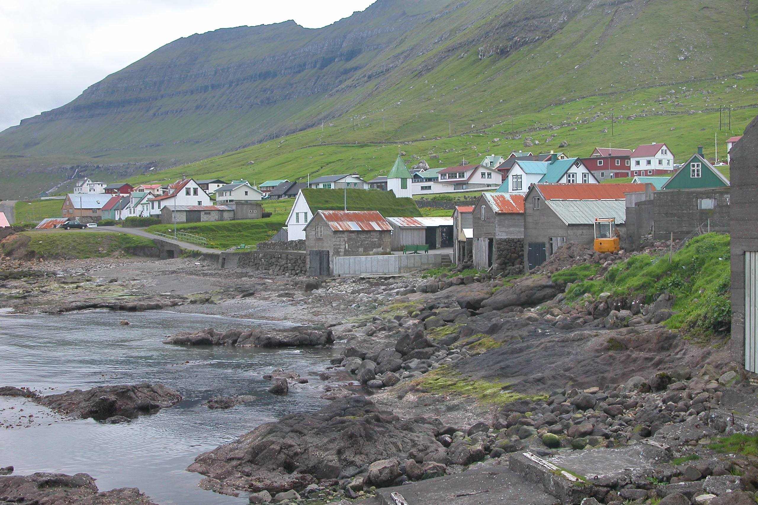 Oyndarfjørður, Eysturoy, Faroe Islands.